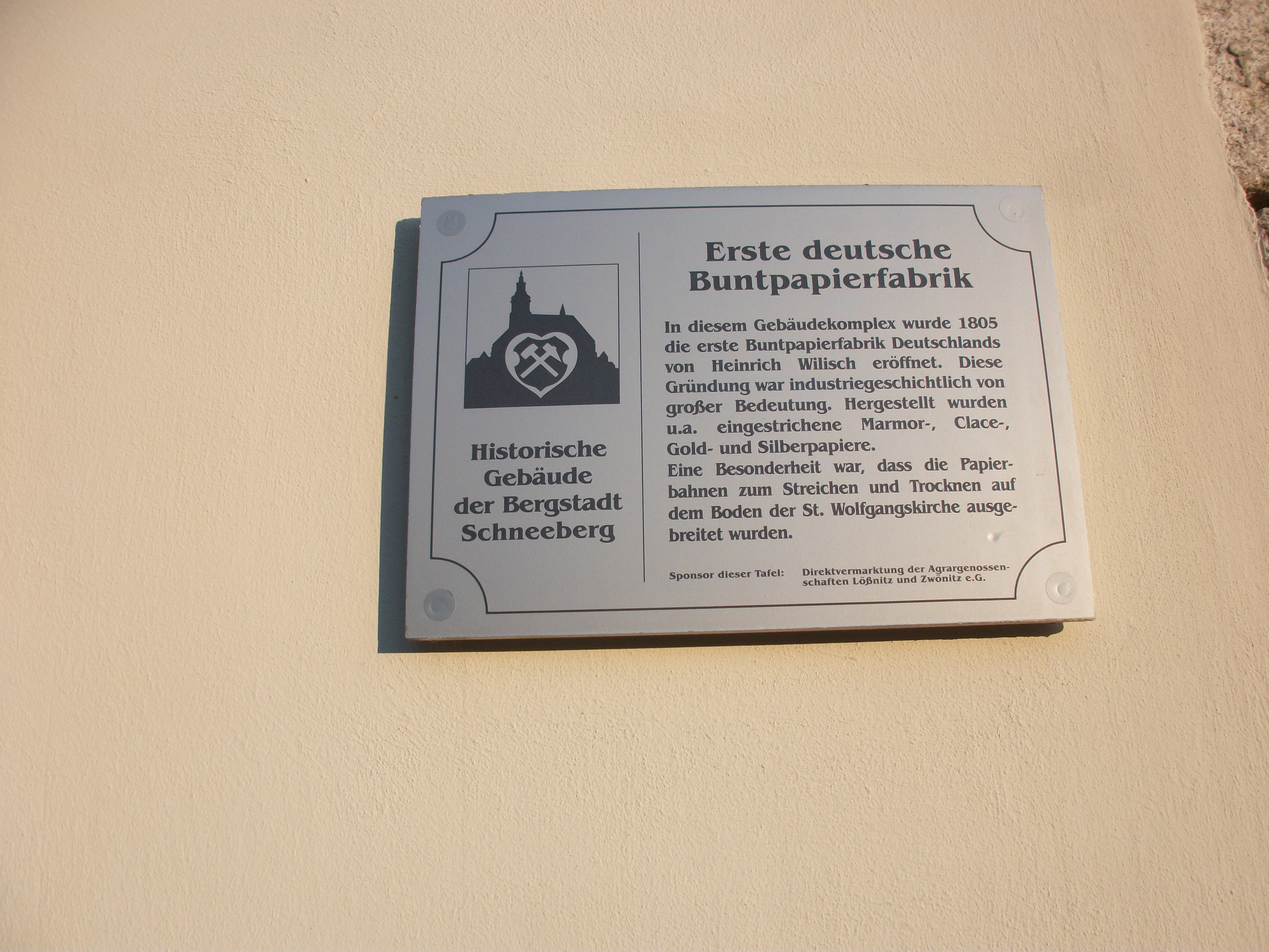 Schneeberg, Obere Zobelgasse 2 (erste Buntpapierfabrik Deutschlands), Infotafel